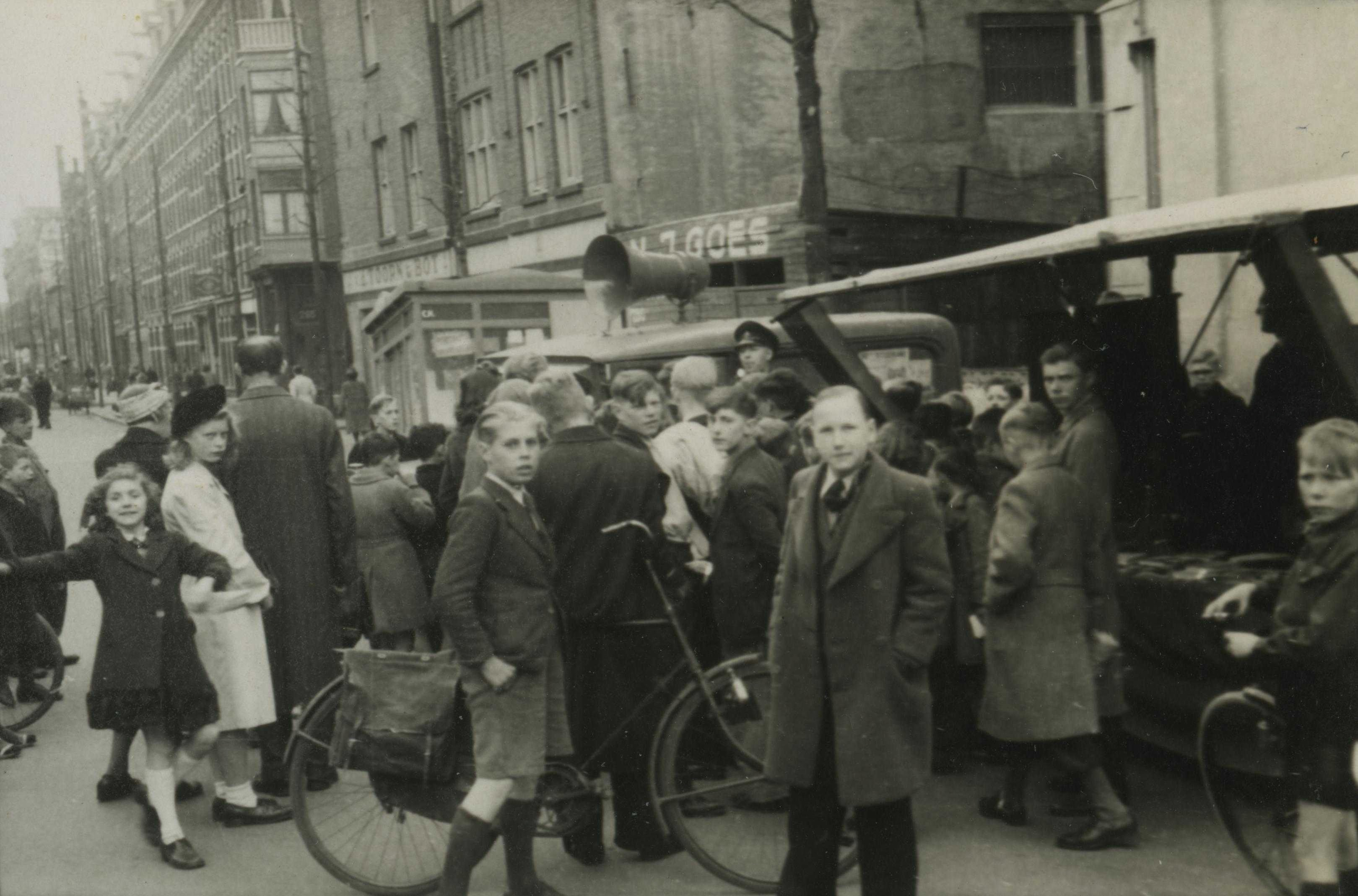 Massale colportage met het NSB-weekblad 'Volk en Vaderland' in Amsterdam door functionarissen van het Hoofdkwartier in de buurt van de Albert Cuyp. Met de leus: “ Ons nationalisme uw redding, ons socialisme uw toekomst” voerde de NSB gedurende drie maanden de actie “ De Strijd om Amsterdam” , van 04-03-1944 tot en met 15-06-1944. Deze foto is afkomstig uit het archief van de Fotodienst der NSB.